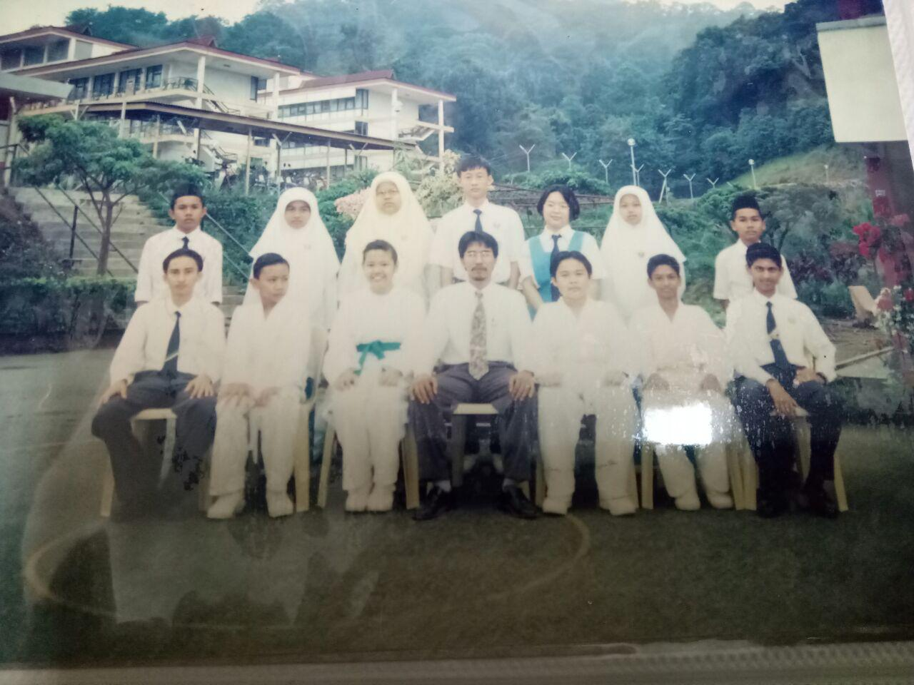 guru dan pelajar